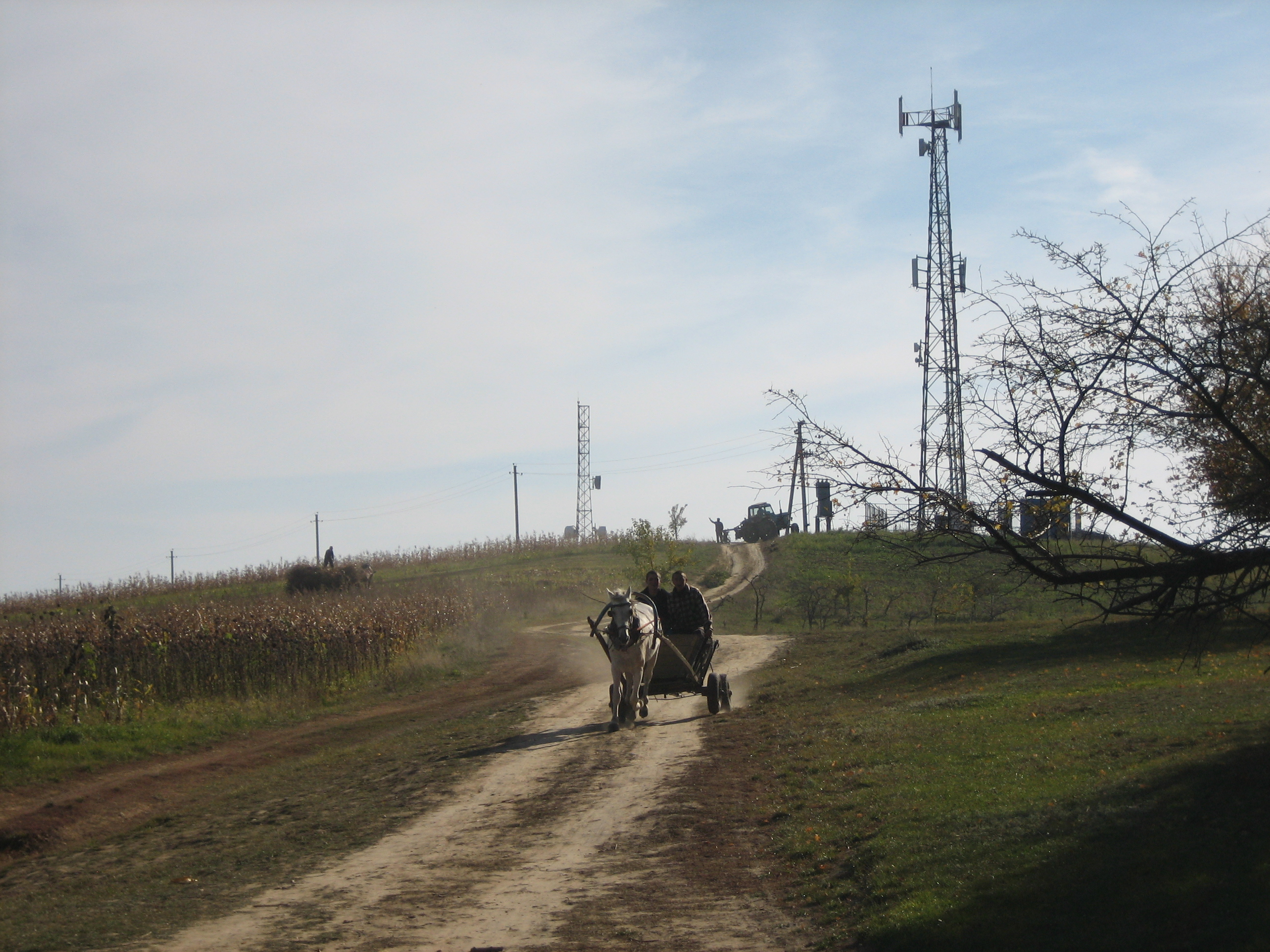 Gipfel Foto